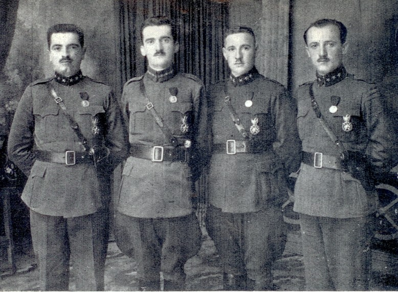 Gjeneral Prenk Pervizi